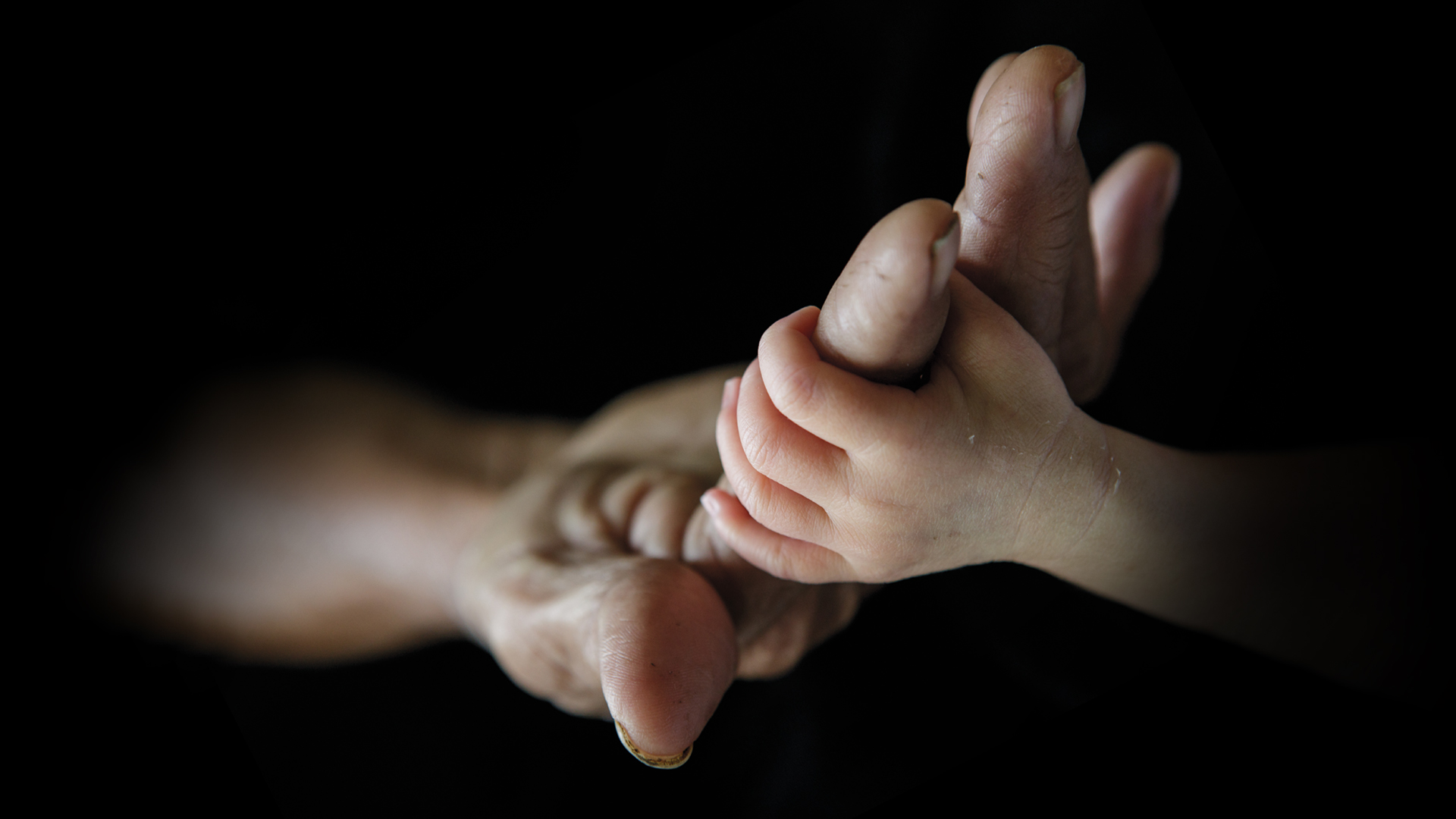 Gure Esku Dagoren giza-katea, 2018. 1-20 kilometroak.